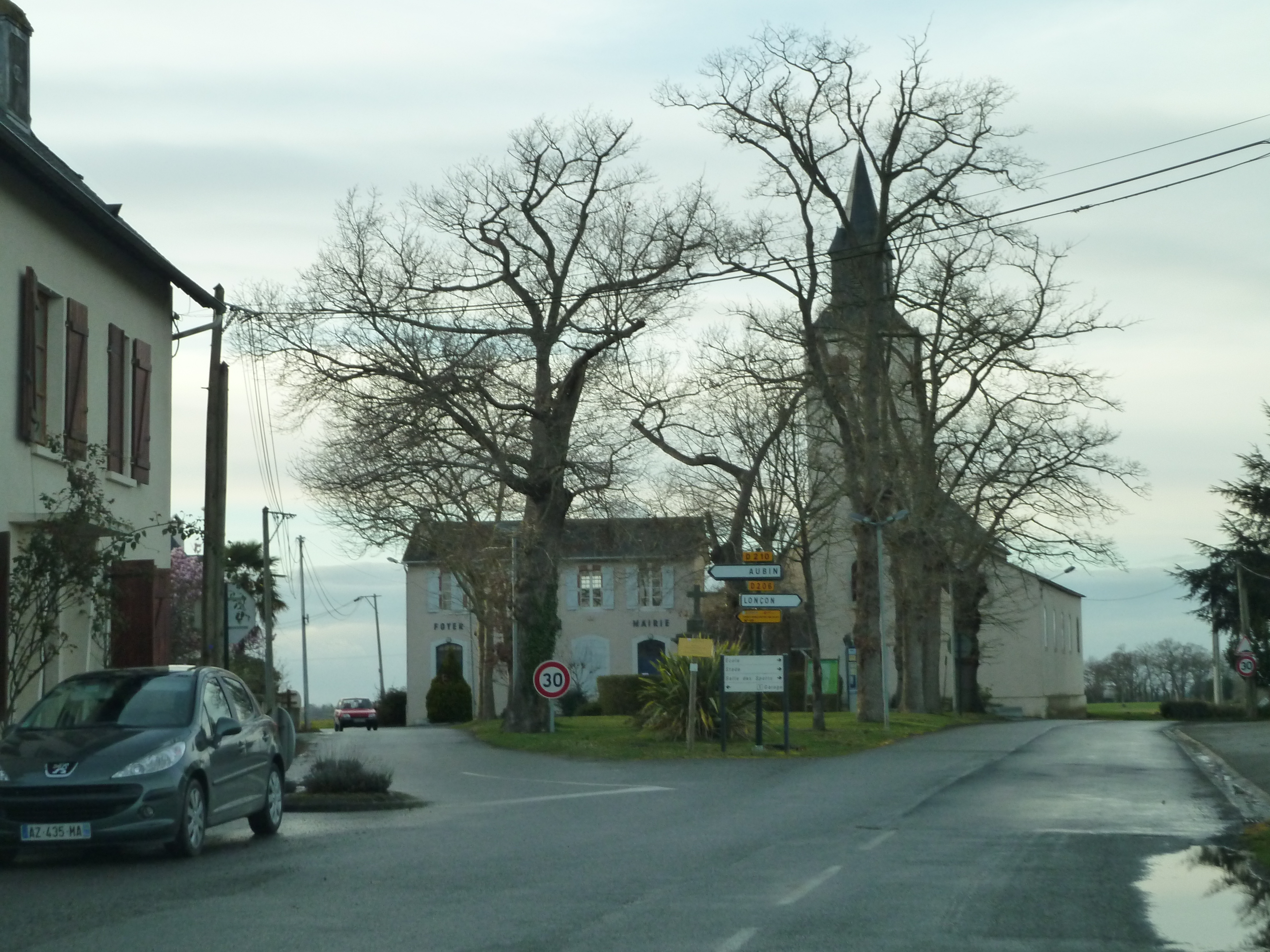 Centre de Bournos